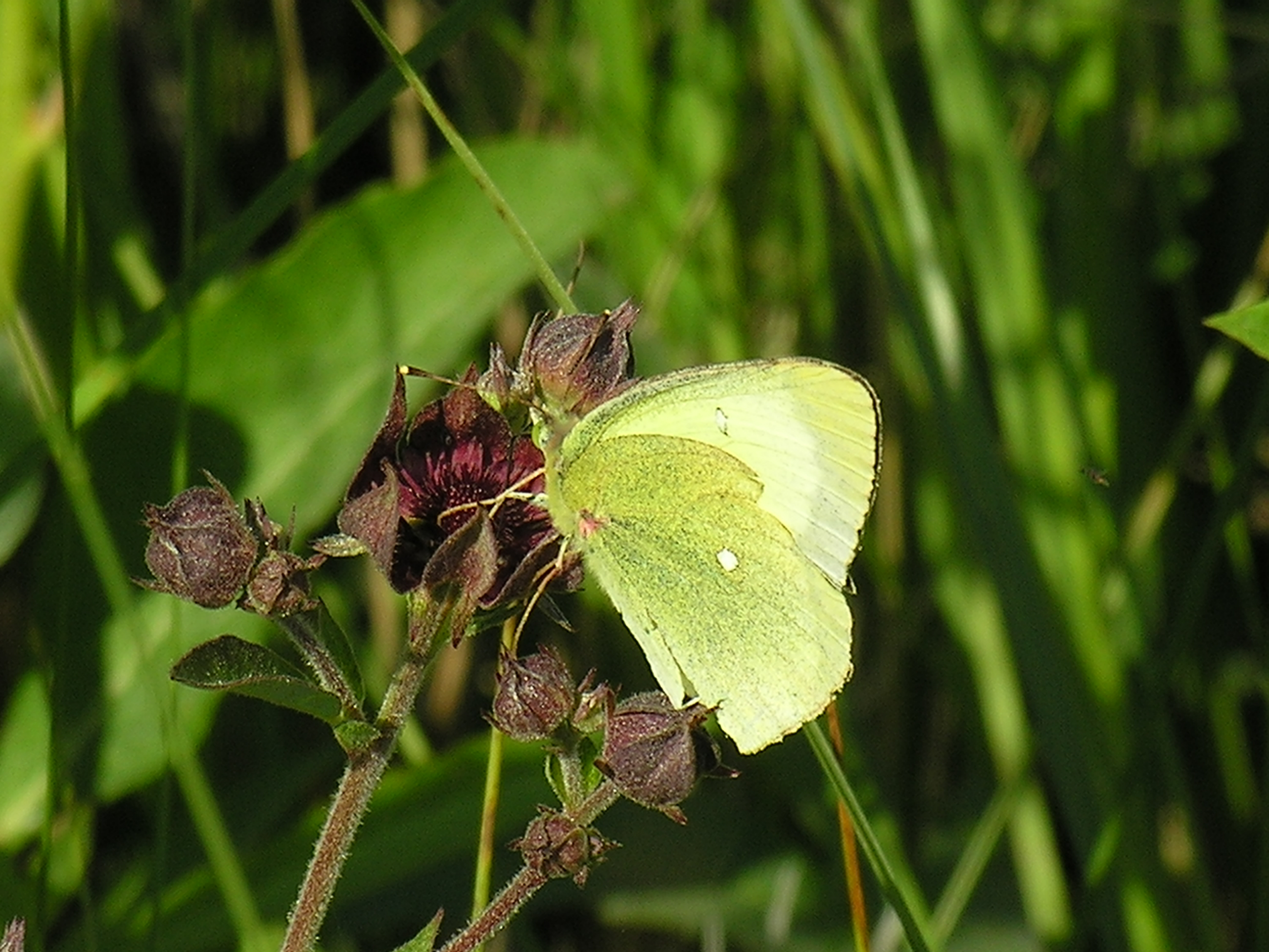 Žluťásek borůvkový